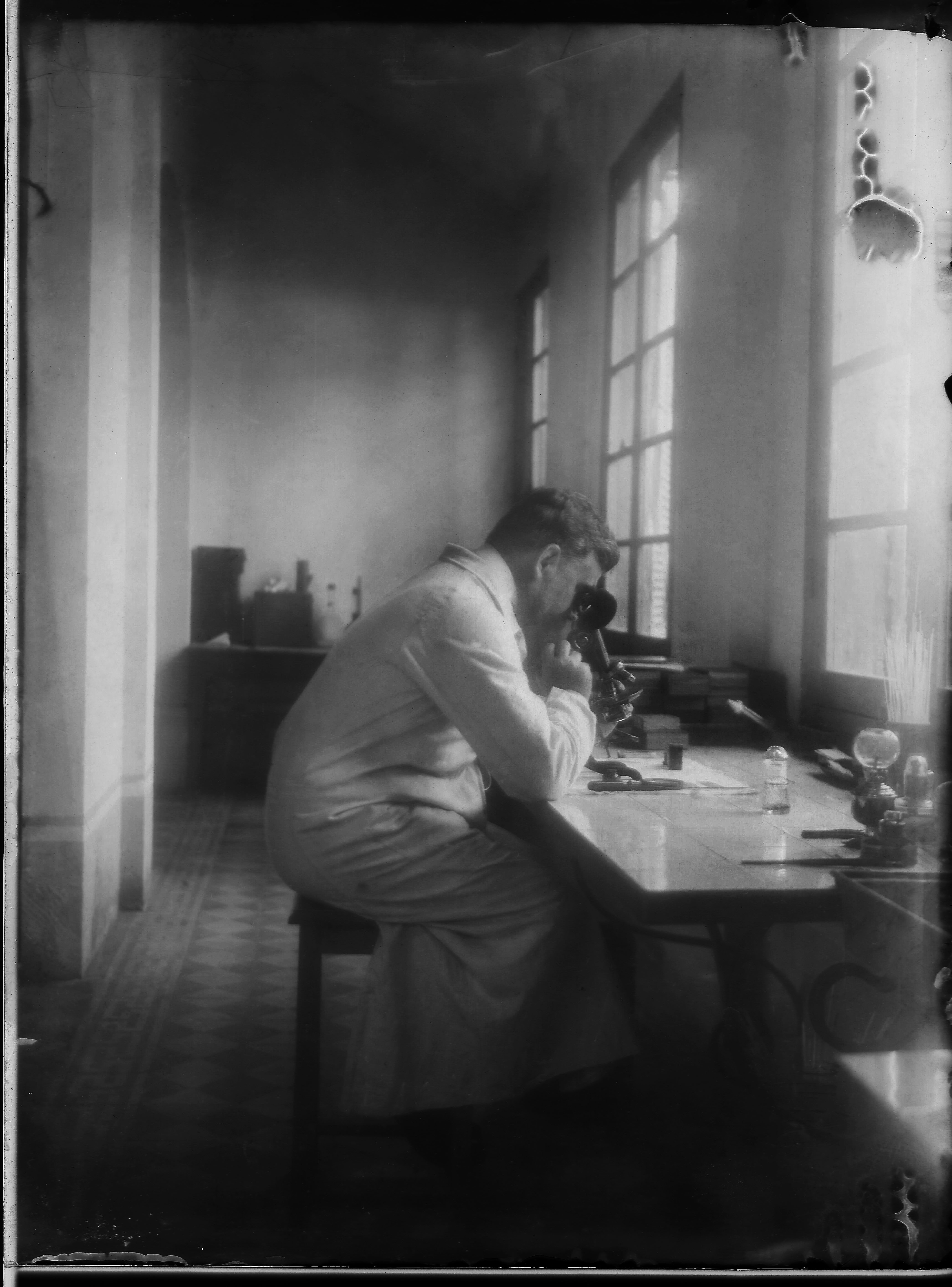 Gaston Bourret penché sur un microscope dans un laboratoire